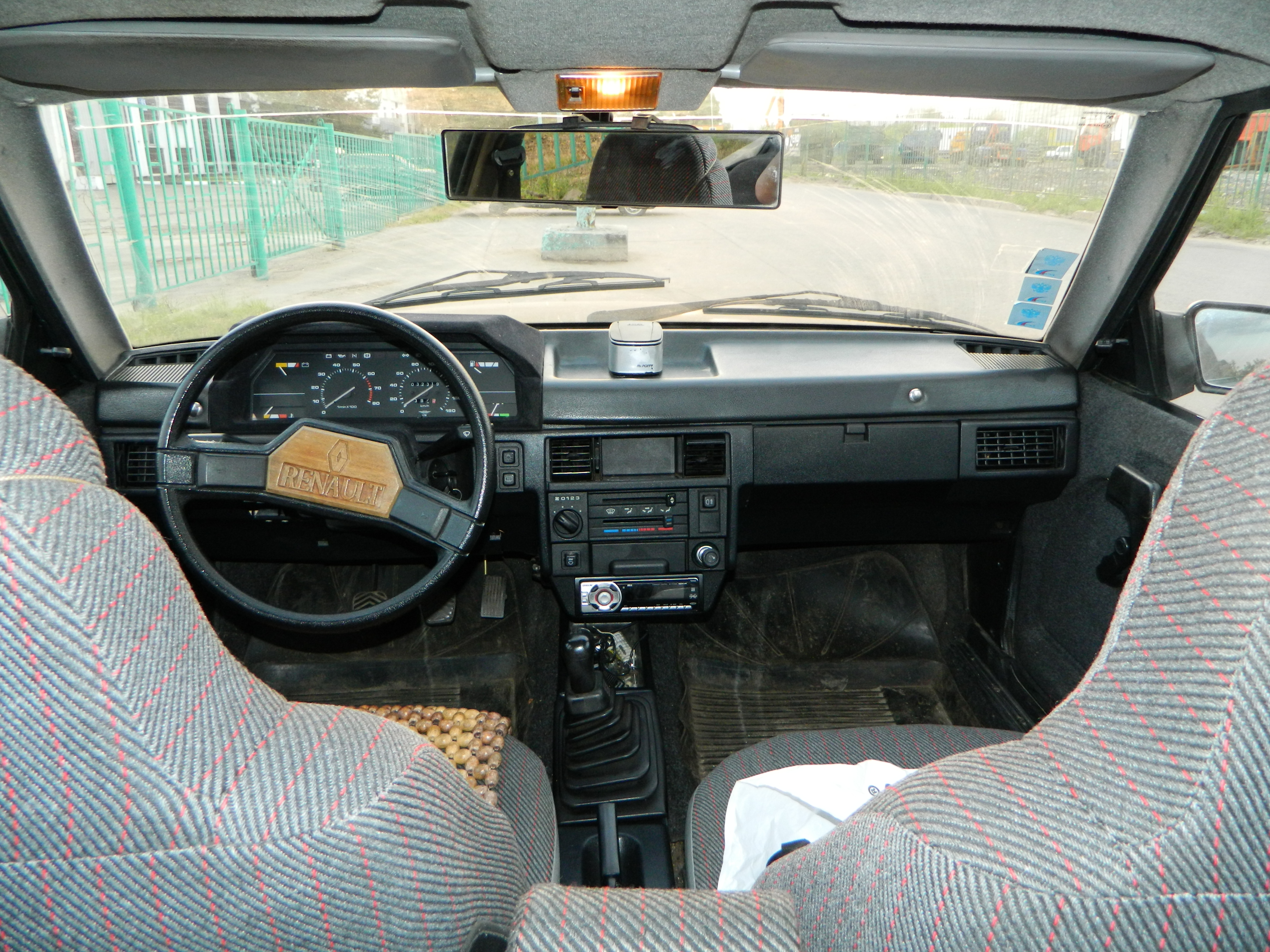 Черный салон автомобиля Москвич Святогор 1999 года выпуска со вклеенным лобовым стеклом.